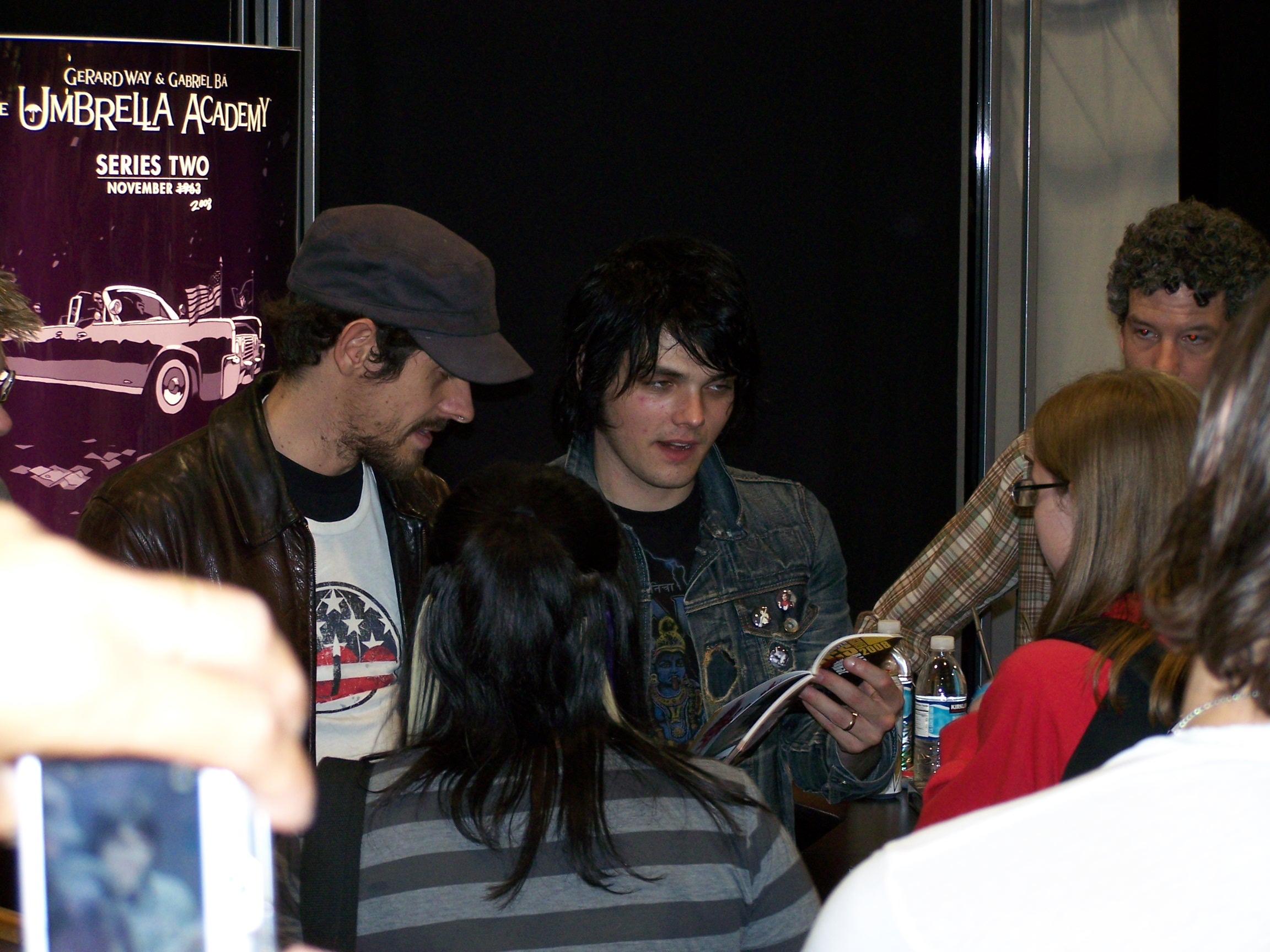 El escritor de cómics Gerard Way y el dibujante Gabriel Bá en la Comic Con de San Diego de 2008, durante una firma de autógrafos del cómic The Umbrella Academy.